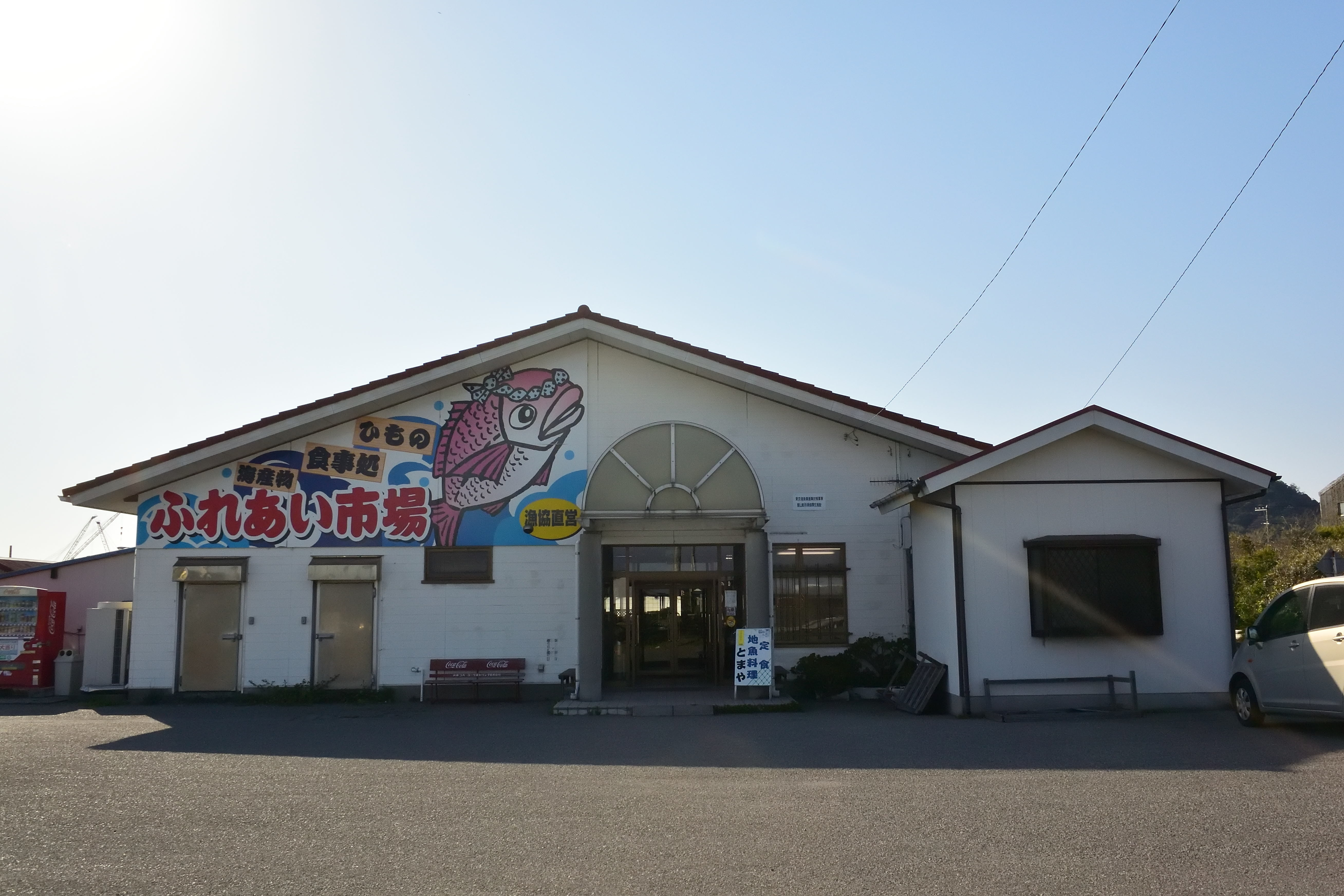 船形漁港 ふれあい市場